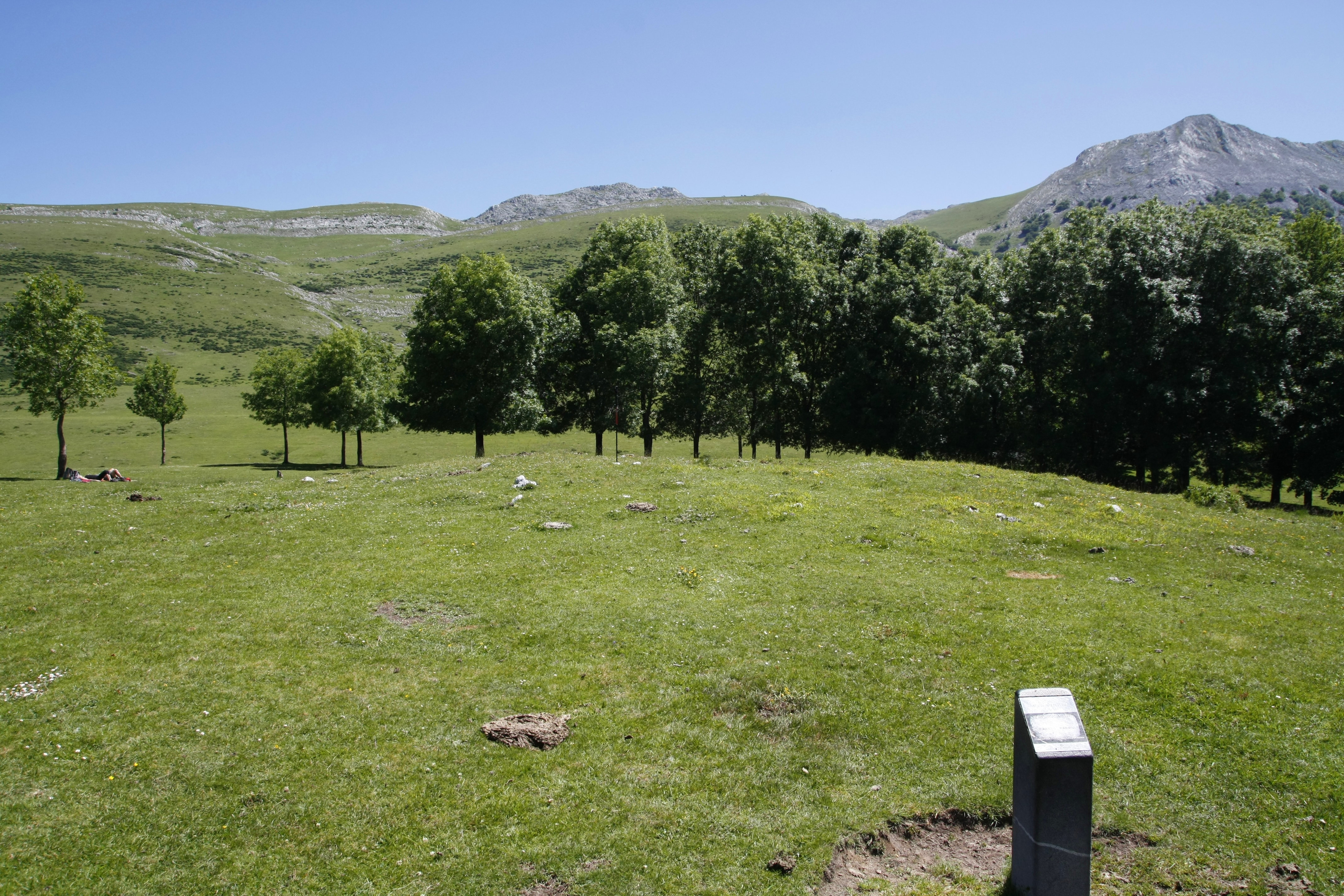 Gorostiaran Ekilalde tumulua